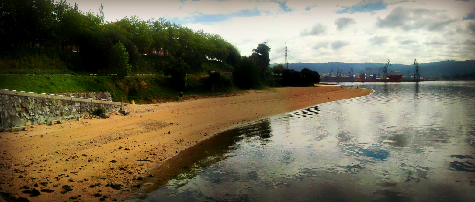 Playa de Caranza, Ferrol